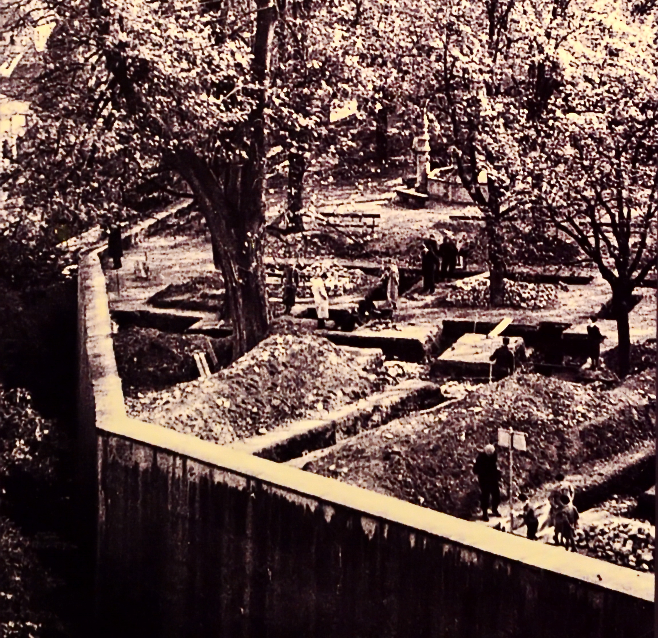 Lindenhof-Keller, Turicum (Zürich) : Die Ausgrabungen der Jahre 1937-1938 von Emil Vogt auf dem Lindenhof.